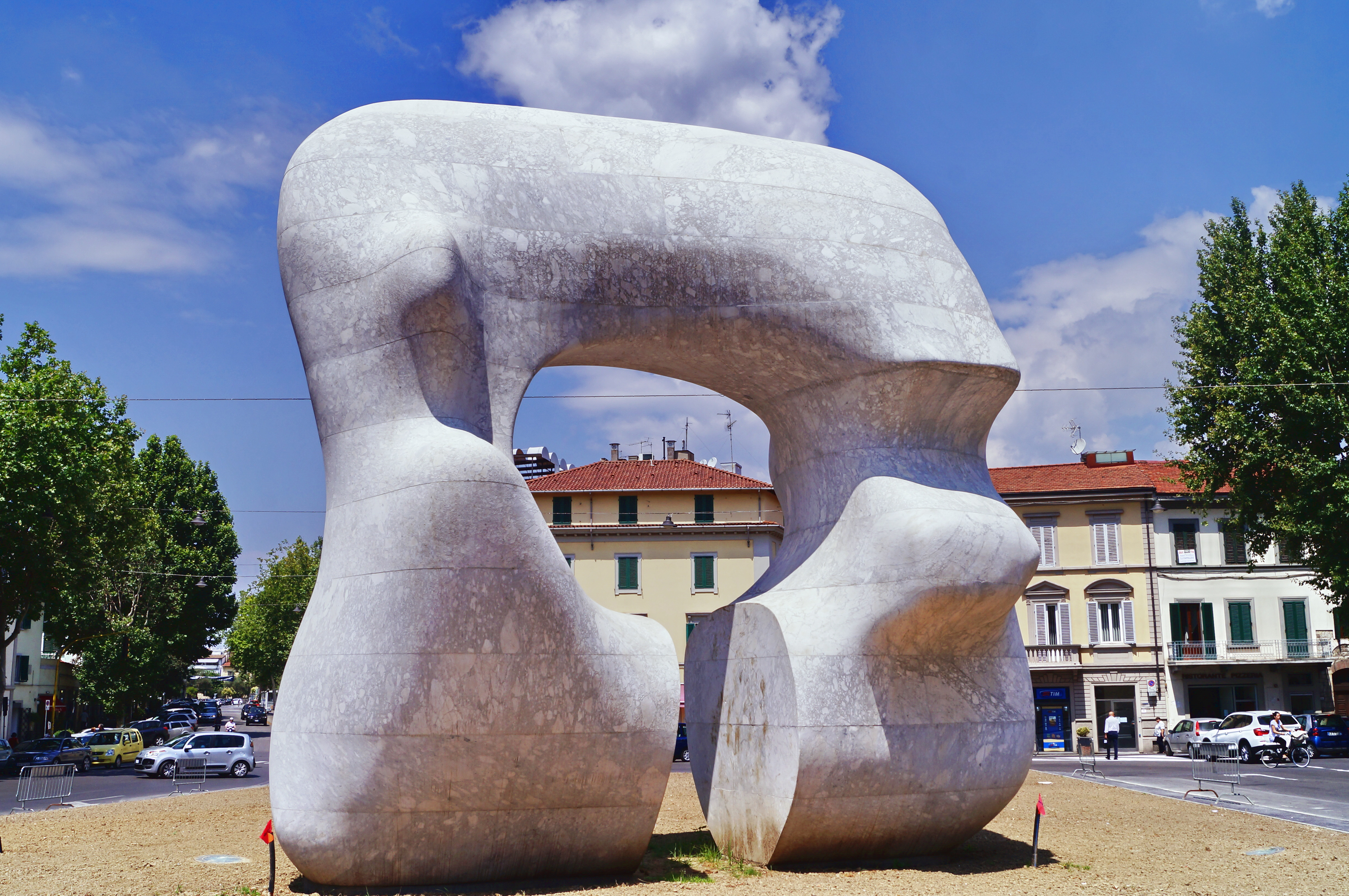 Statua di Henry Moore (Forma Squadrata con taglio), Prato, Toscana, Italia This is a photo of a monument which is part of cultural heritage of Italy.